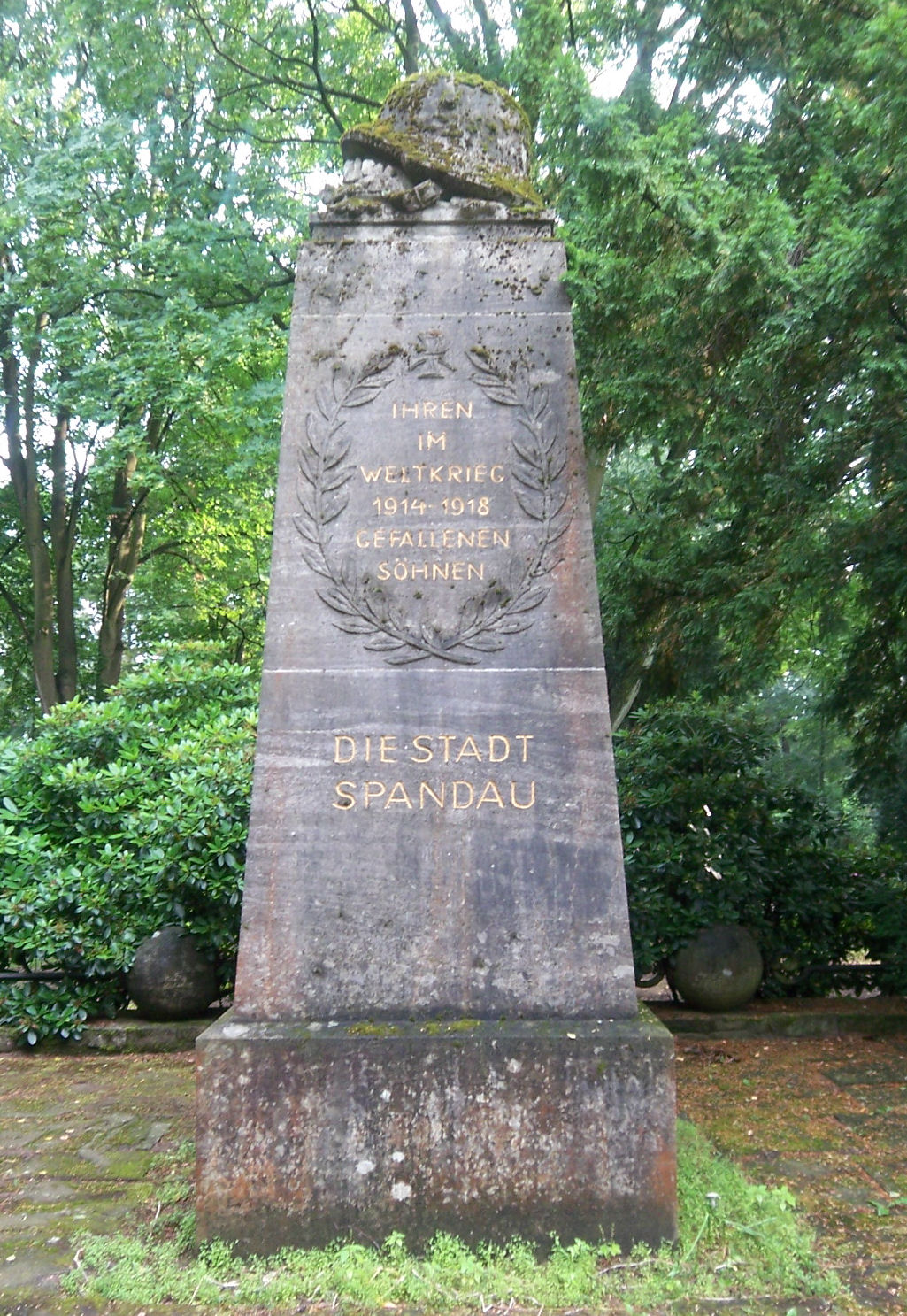 Denkmal für die Gefallenen von 1914–1918 „In den Kisseln“